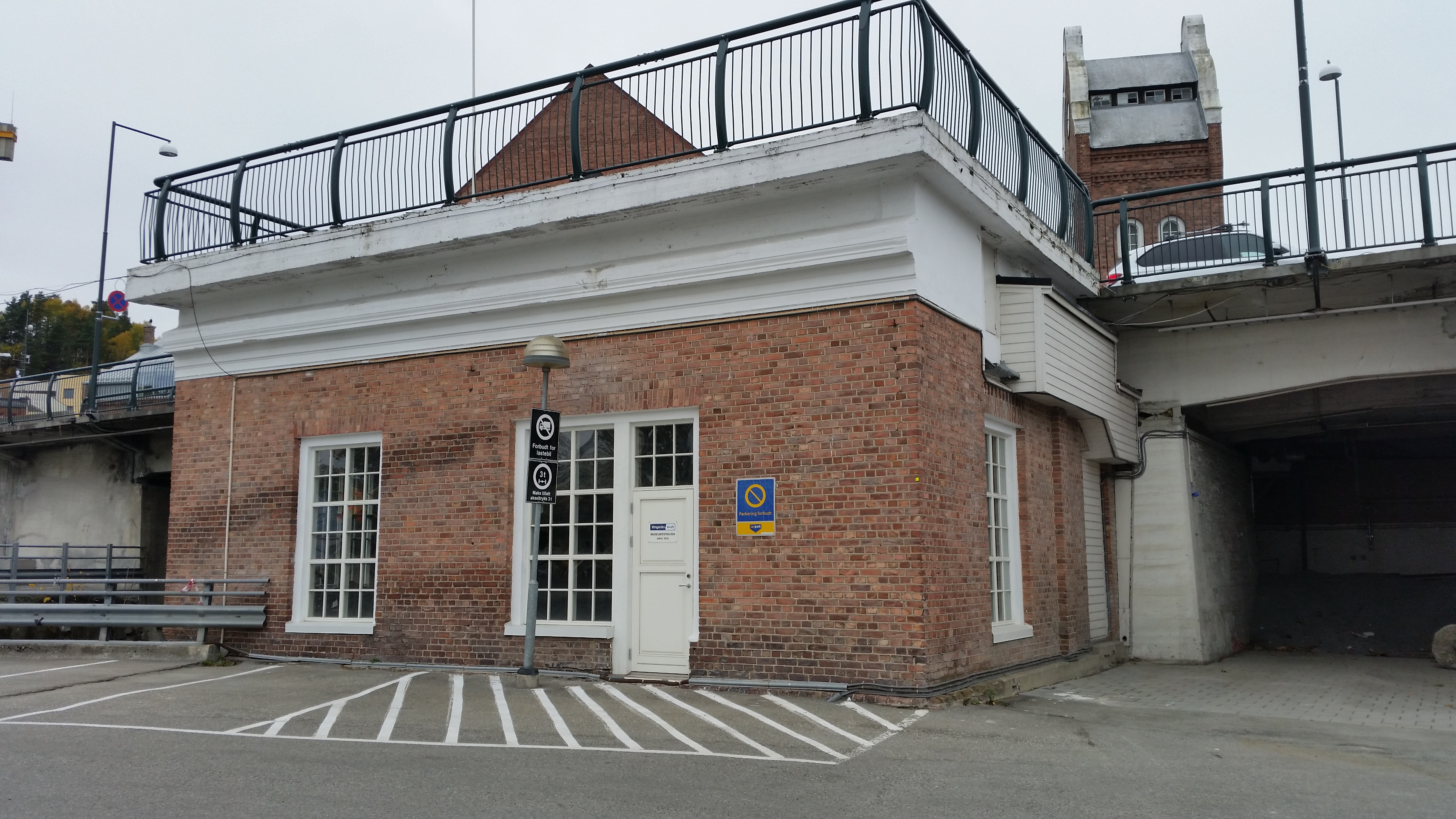 Kraftstasjonen hadde et aggregat på 1 000 hk og sørget i en tid for at Hønefoss fikk gatebelysning, som den andre byen i Norge.